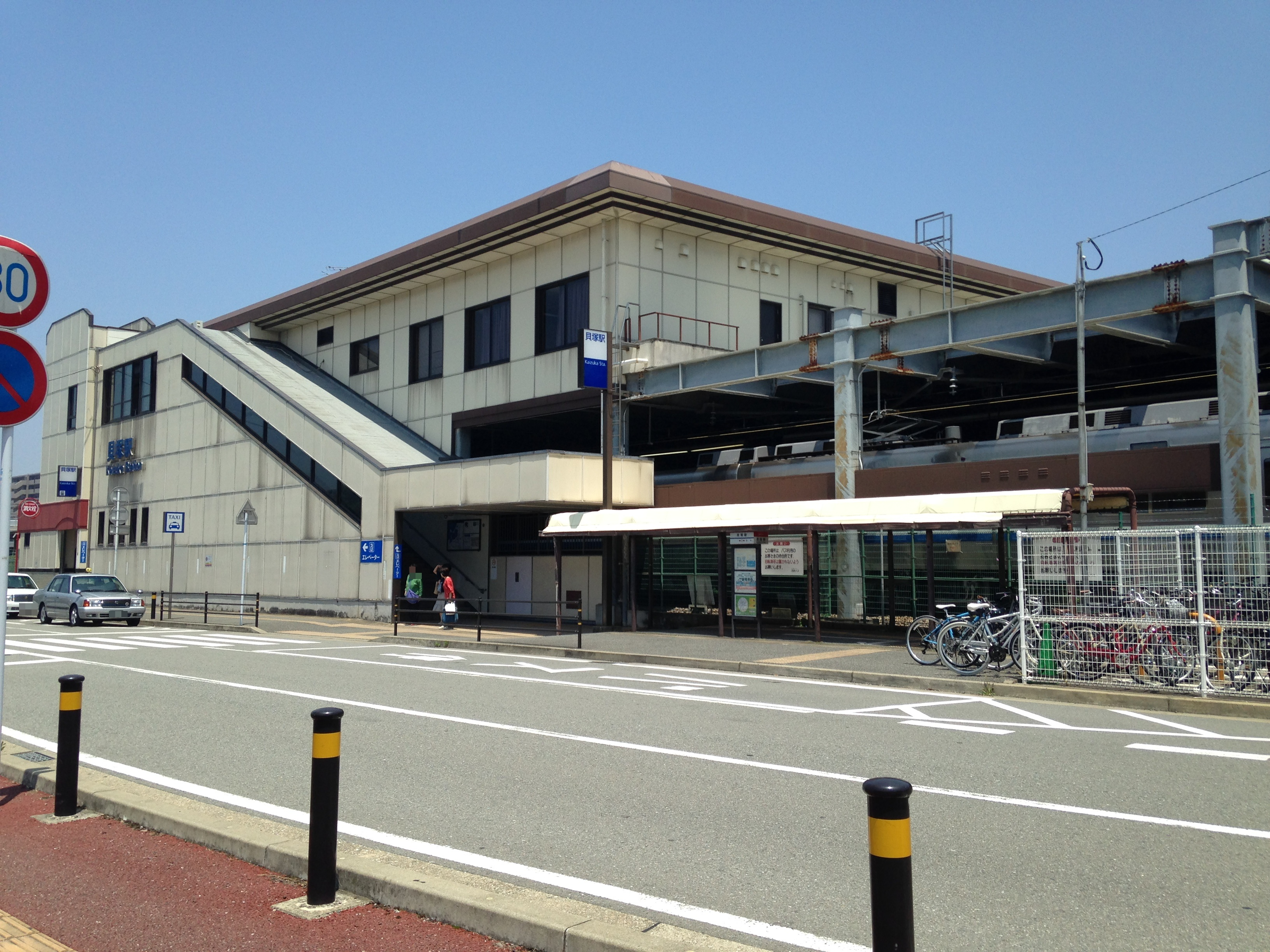 貝塚駅(福岡県)の駅舎